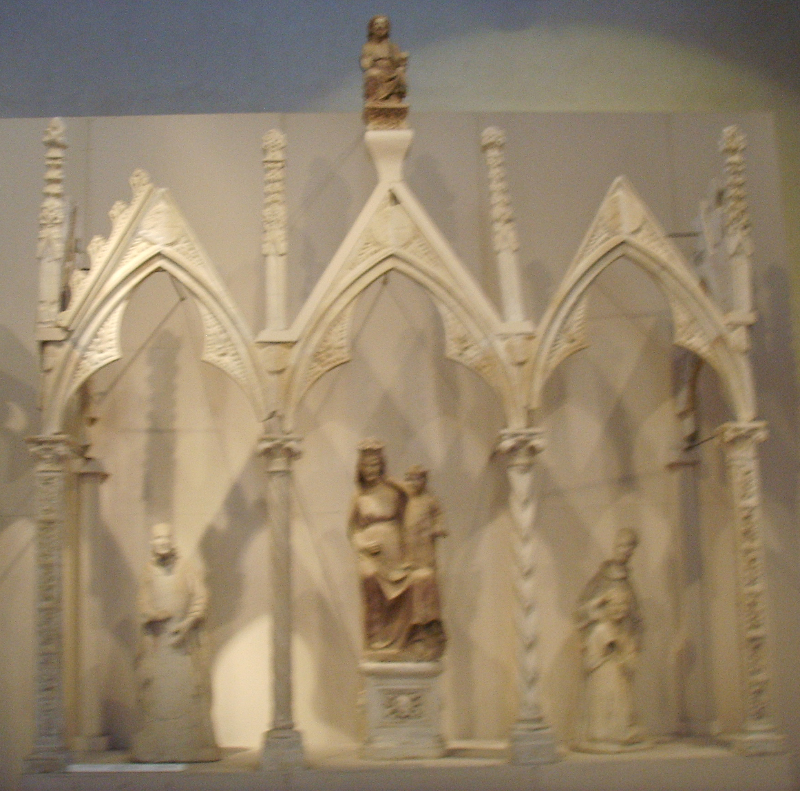 Museo di San Matteo (Pisa) - Lupo di Francesco, Sepolcro dei conti della Gherardesca. Prima metà del XIV secolo.